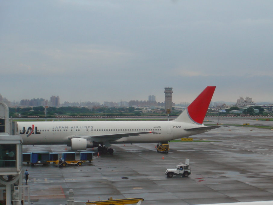 使用日本航空767飛行高雄～成田航線的日亞航班機。